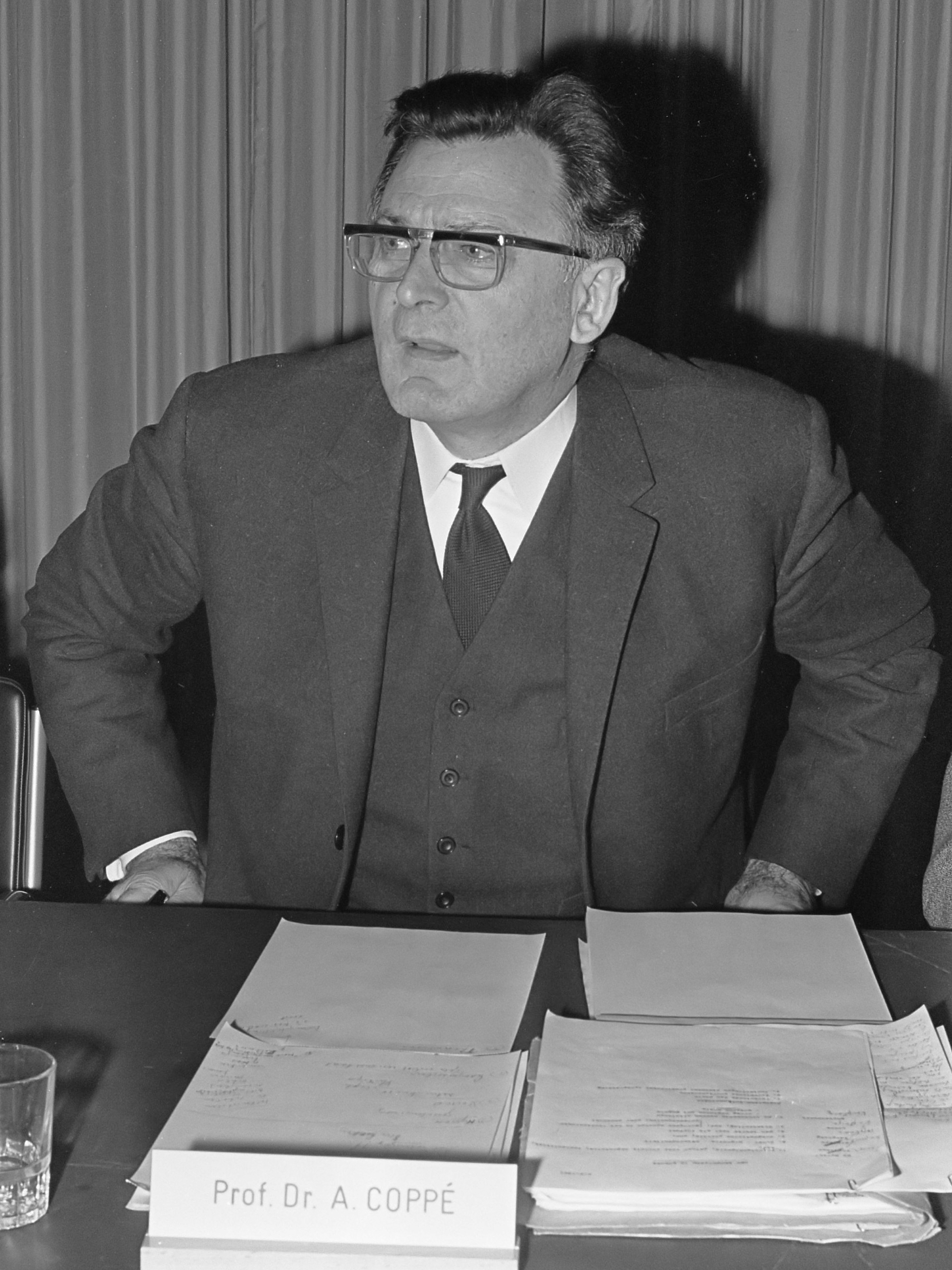 Nederlands Congres in Doelen te Rotterdam, nummer 22 en 2 prof. dr. A. Coppe , nummer 25 dr. Th. W. Vogelaar 17 februari 1967